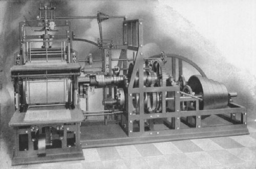 Bild von vor 1900